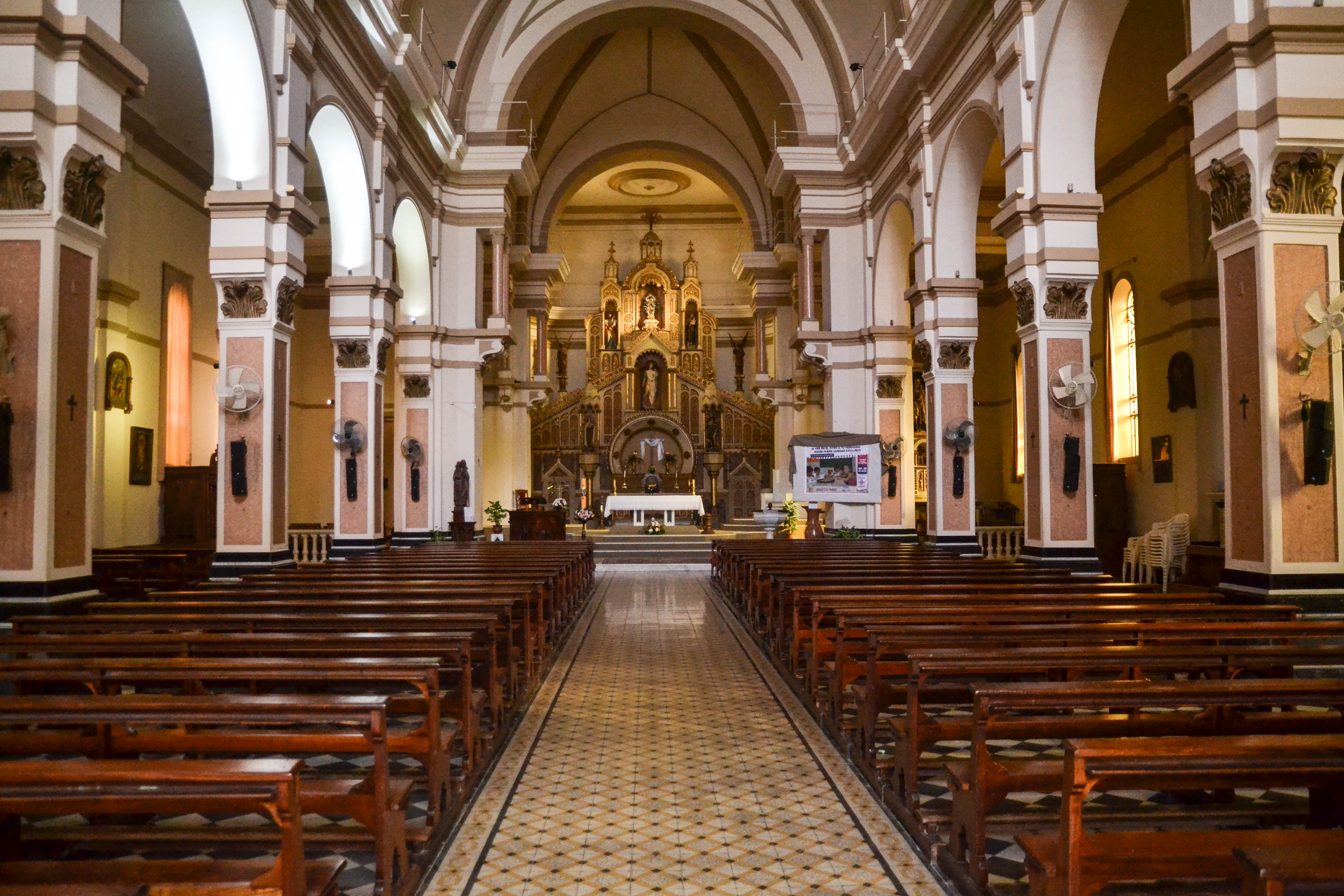 Interior Catedral San Rafael Arcángel - Rafaela (Santa Fe)